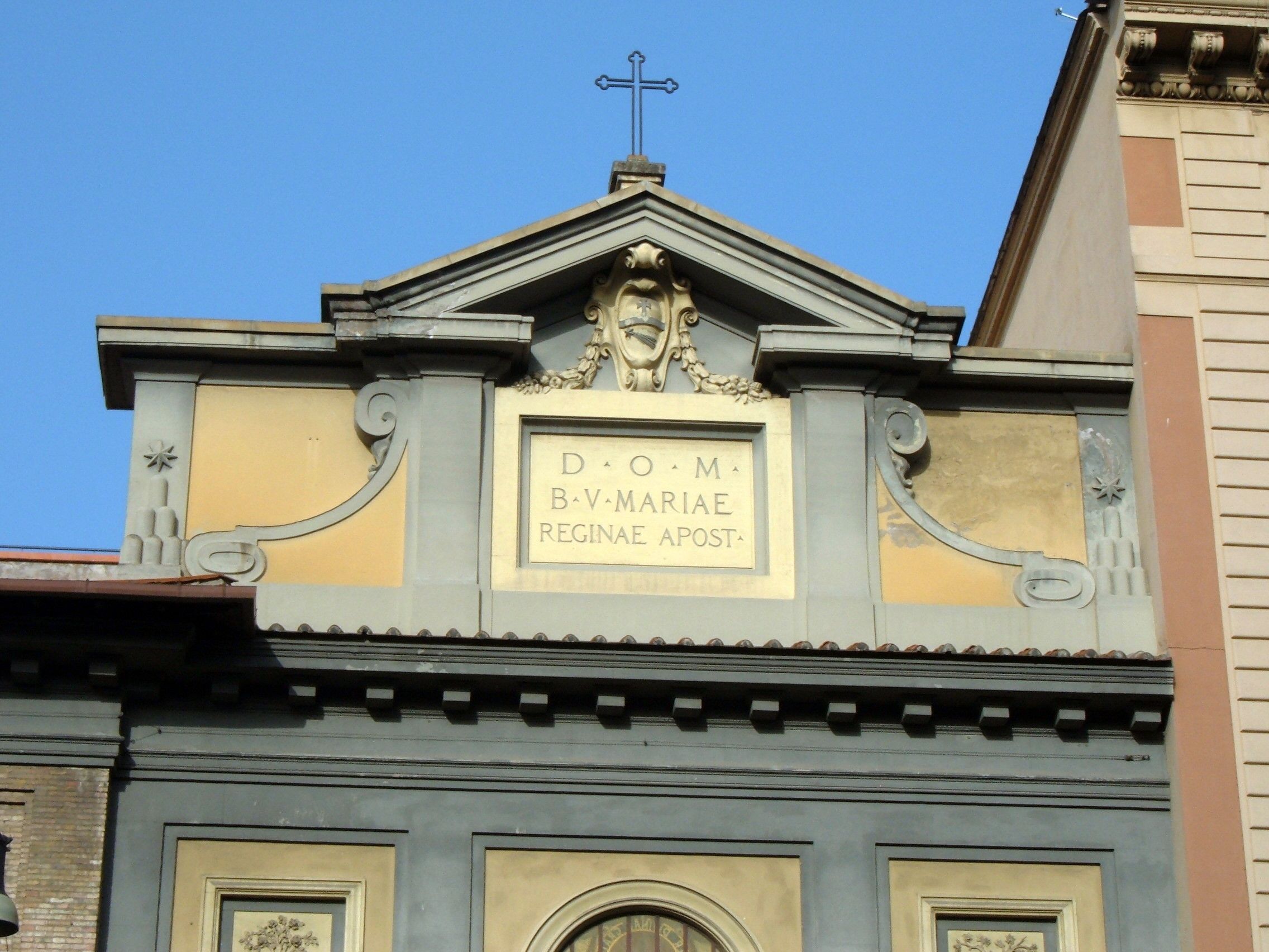 Chiesa di Santa Maria Regina Apostolorum, a Roma, nel quartiere Della Vittoria, in via Ferrari.